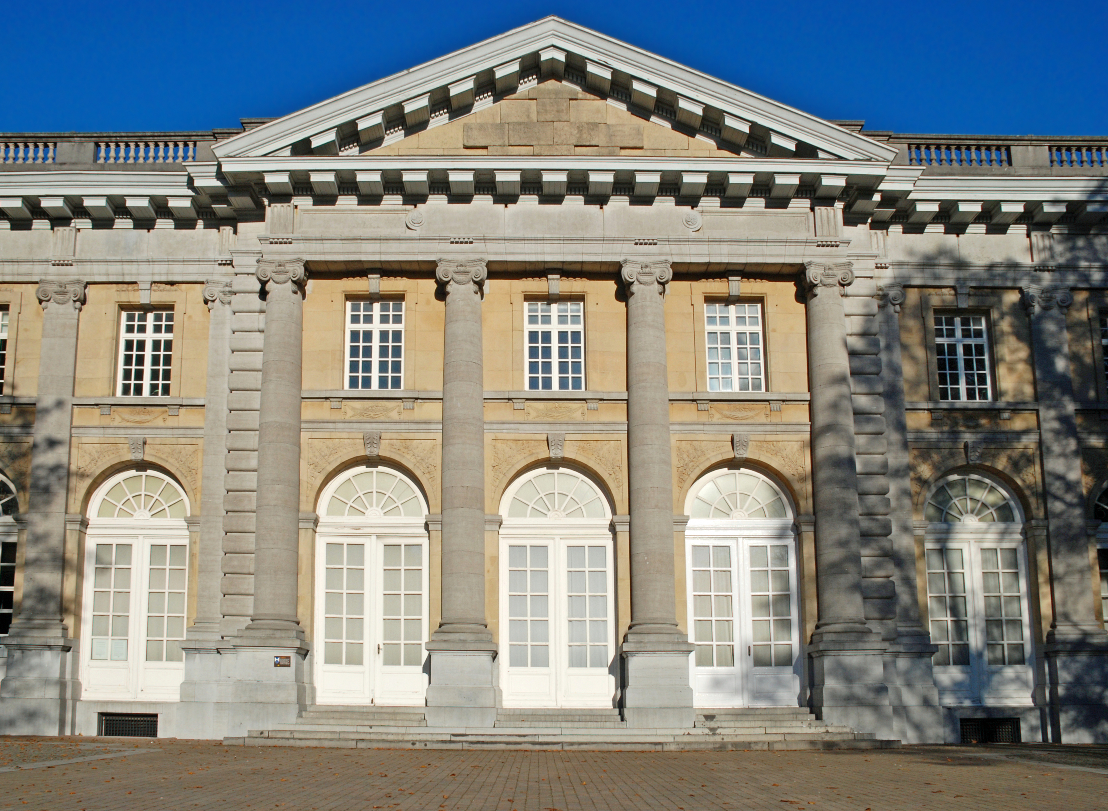 Belgique - Brabant flamand - Palais des Colonies (Tervuren)